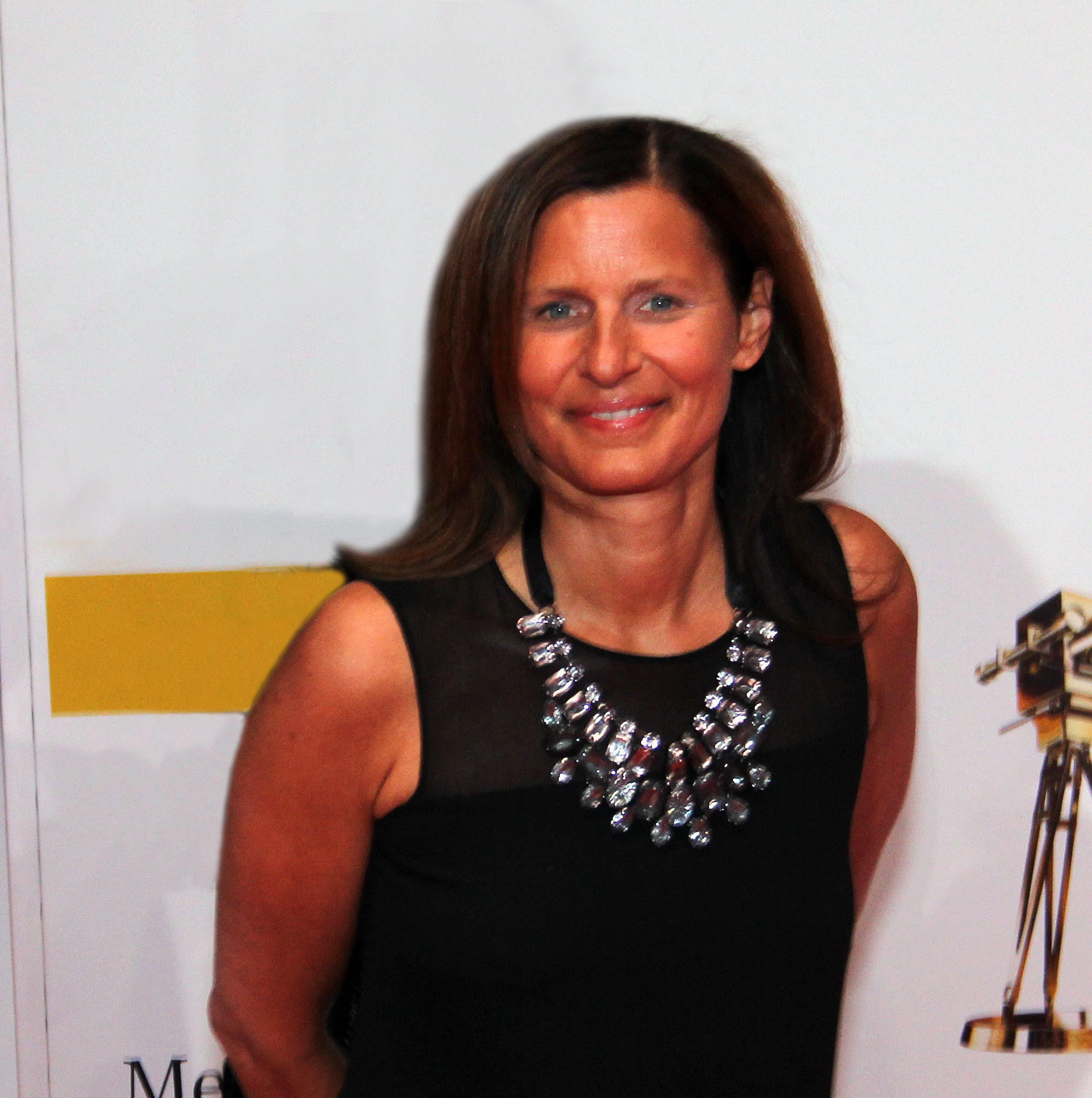 Katrin Müller-Hohenstein bei der Goldenen Kamera 2012